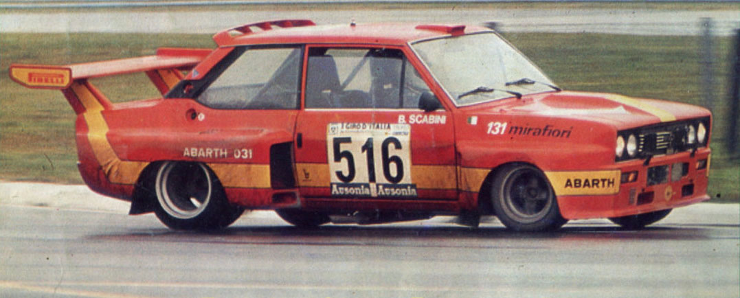 Imola, autodromo Dino Ferrari, 13 ottobre 1975. Il pilota italiano Giorgio Pianta alla guida del prototipo da competizione Fiat Abarth 031 durante la tappa di Imola del Giro automobilistico d'Italia 1975.Original caption: "Giorgio Pianta ad Imola con la Fiat-Abarth 031 "preserie" che ha vinto a sorpresa il Giro d'Italia grazie alle qualità sue e del pilota sulle piste quasi sempre bagnate."